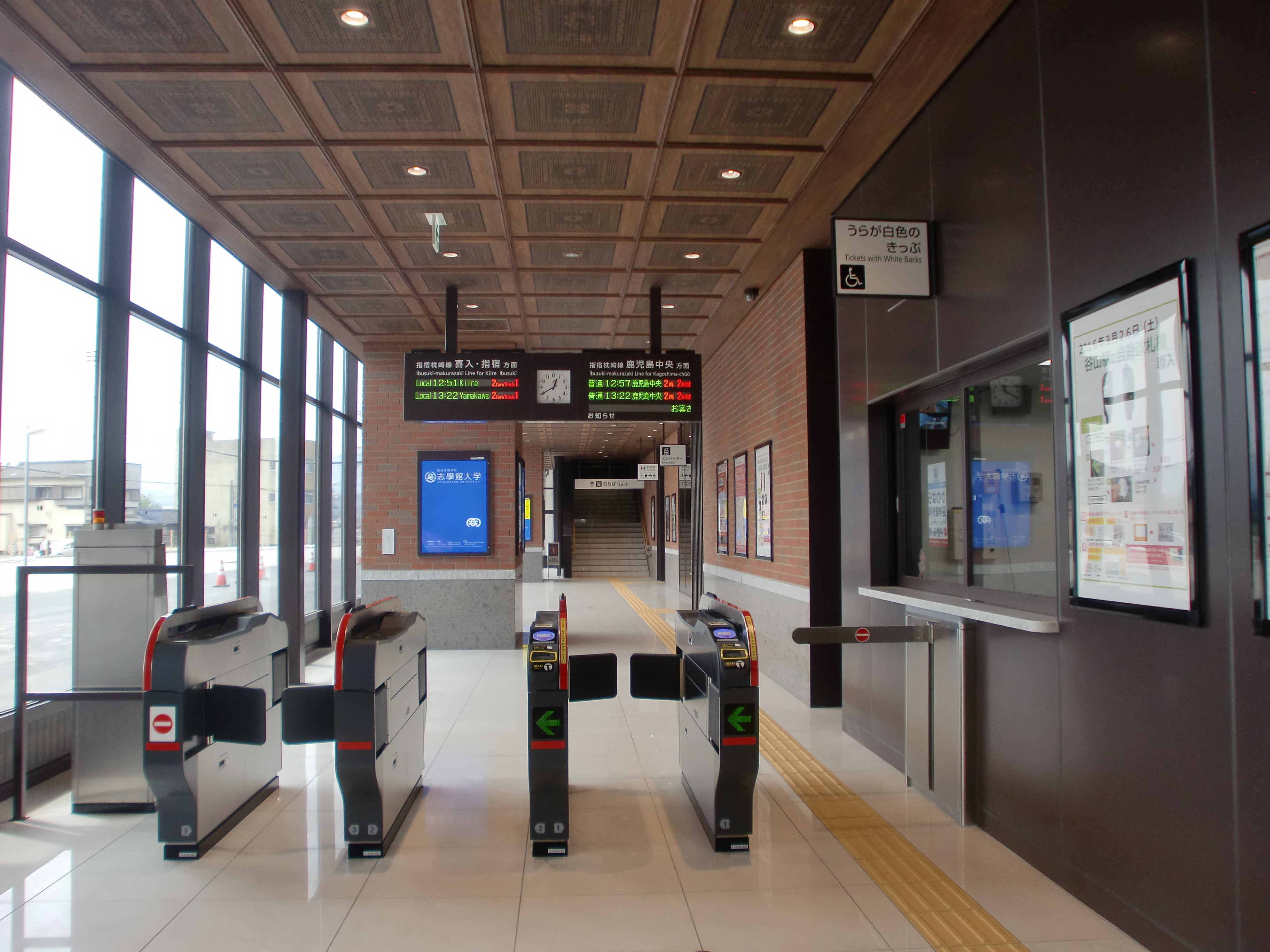 谷山駅（3代目高架駅）の改札口